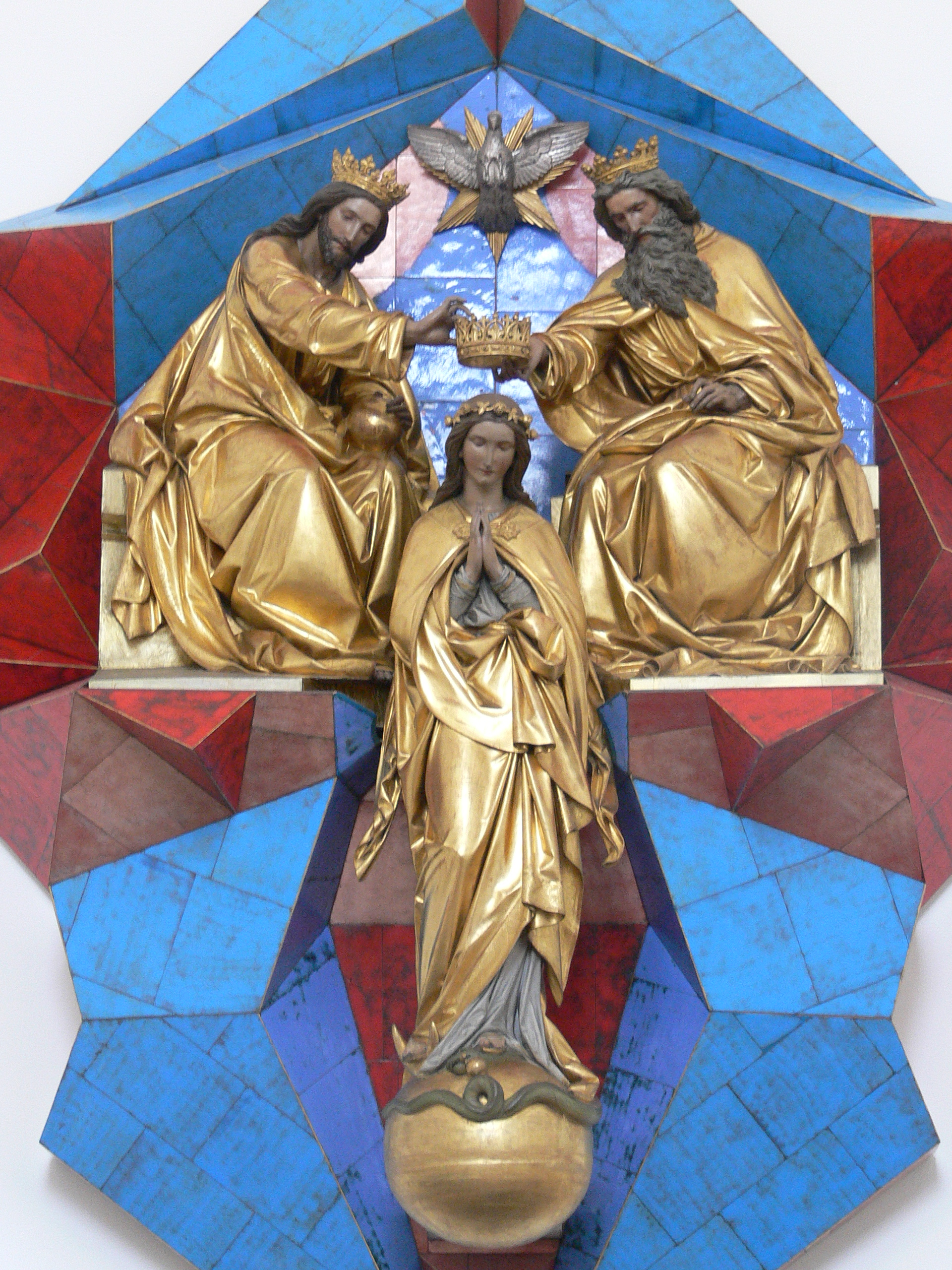 Passau, Marianische Votivkirche "Marienkrönung" von Joseph Knabl, 1863 (vor modernem Hintergrund von 1988)